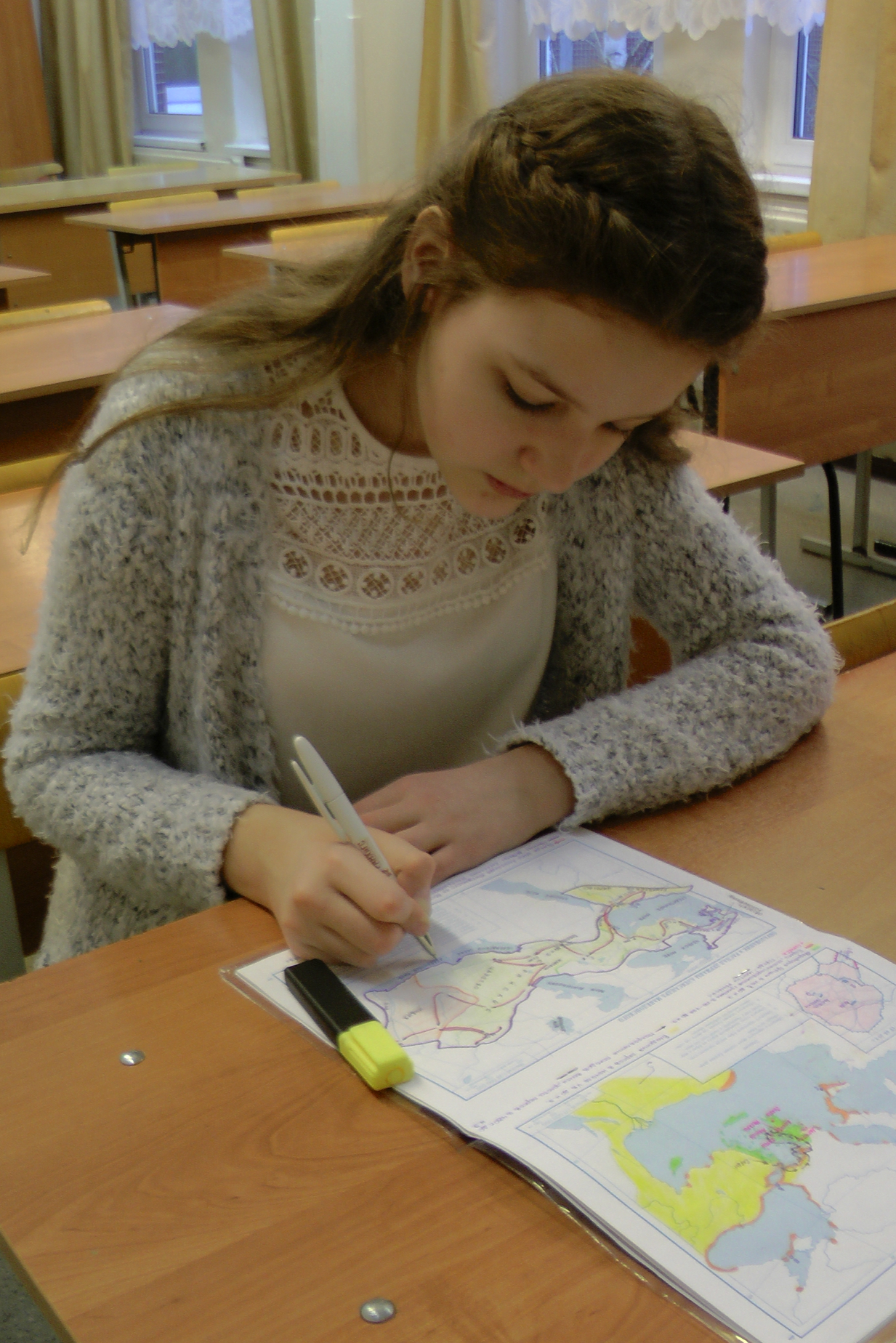 Выполнение контурной карты ученицей лицея № 344 Санкт-Петербурга Раевой Алисой.